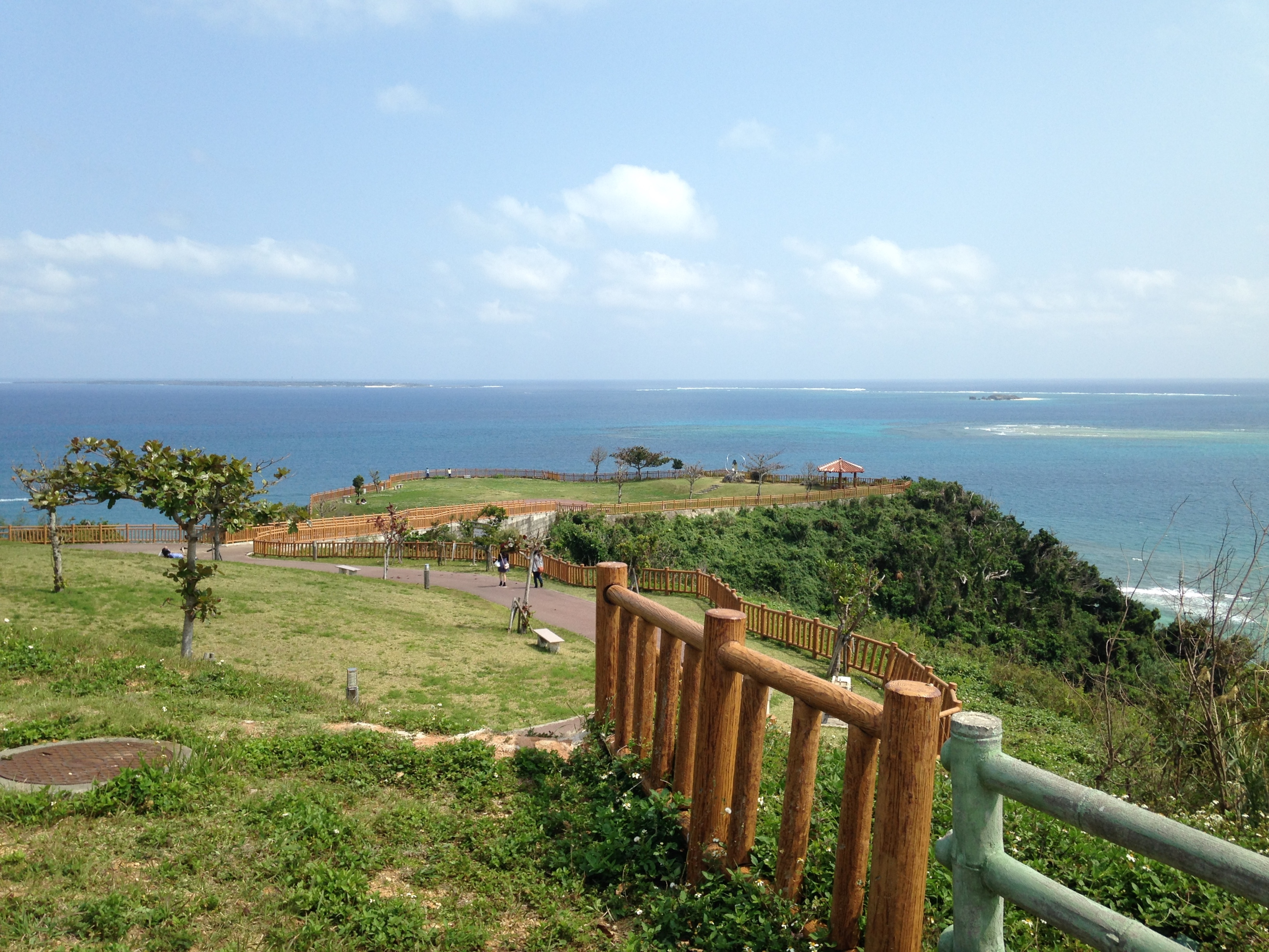 知念岬公園より望む久高島とクマカ島